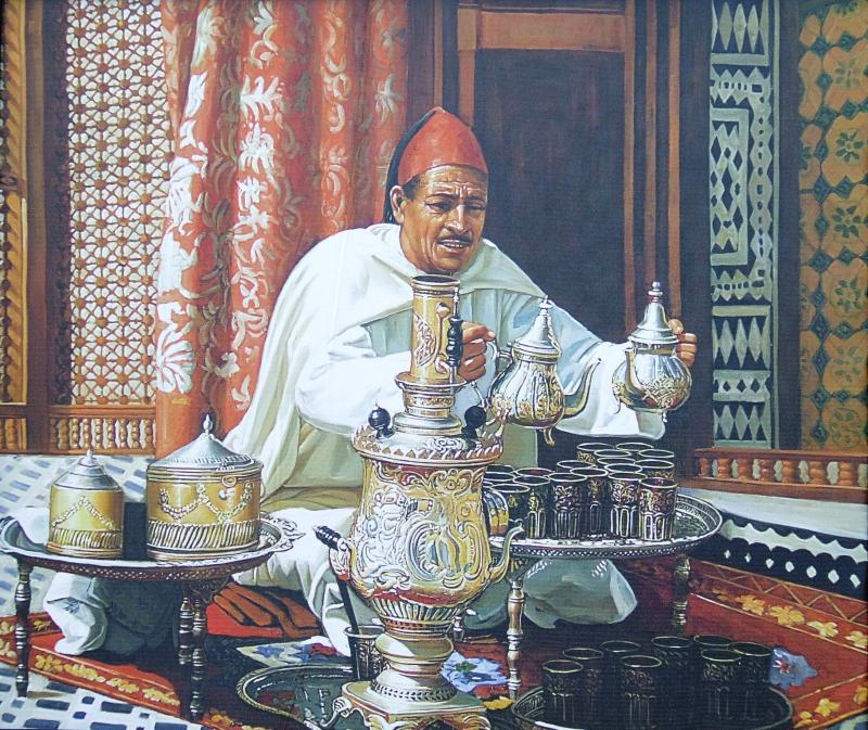 Il rito del thè, vero simbolo culturale marocchino ed espressione di una ospitalità ancestrale